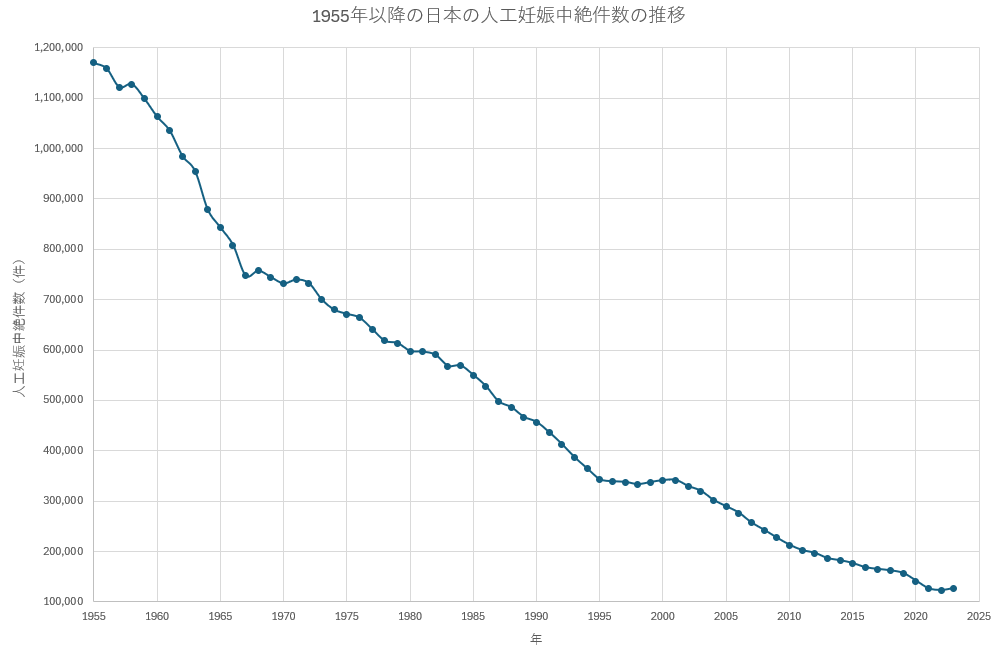 1955年以降の日本の人工妊娠中絶件数の推移